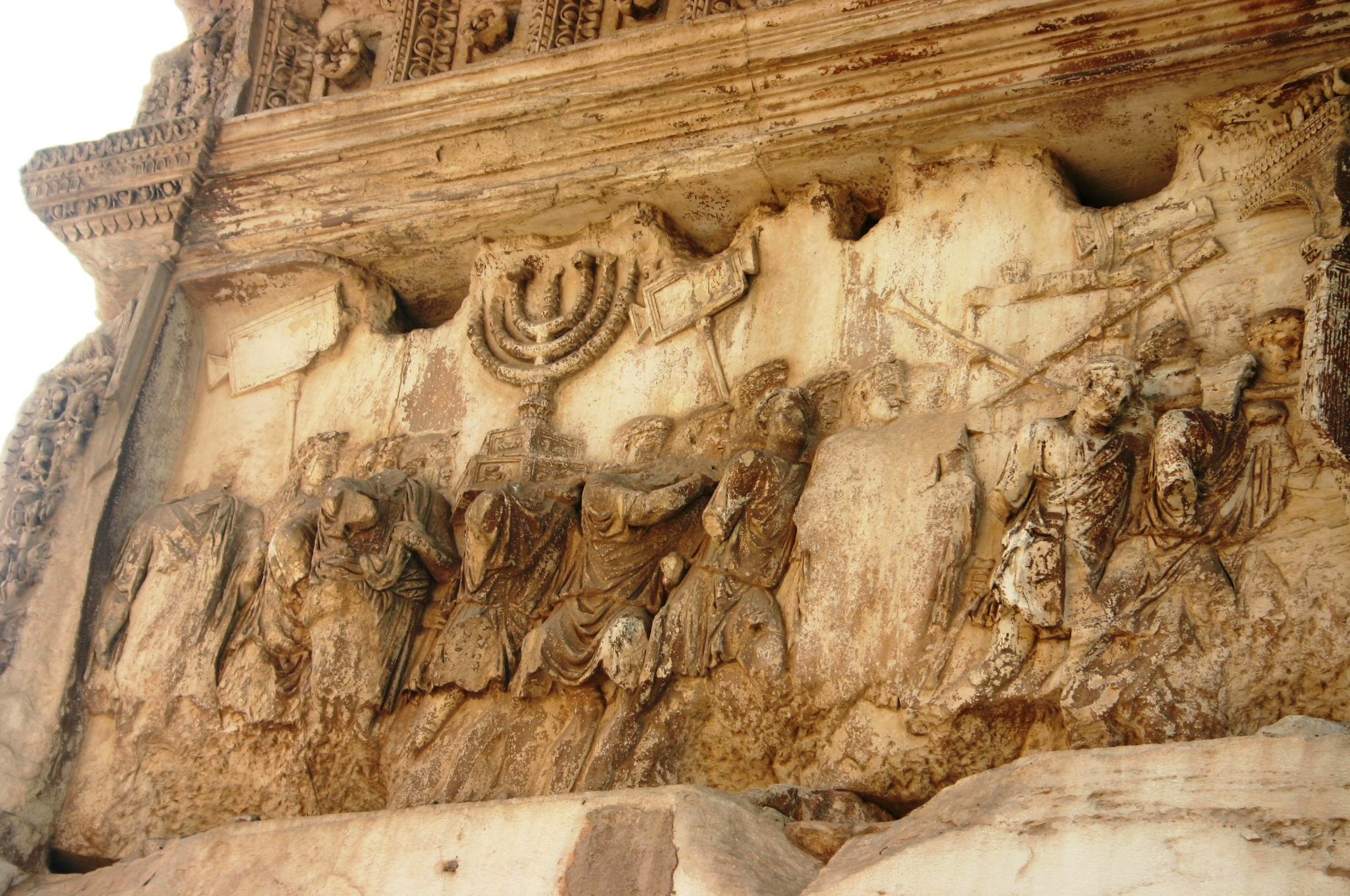 Imagens de Aparecida